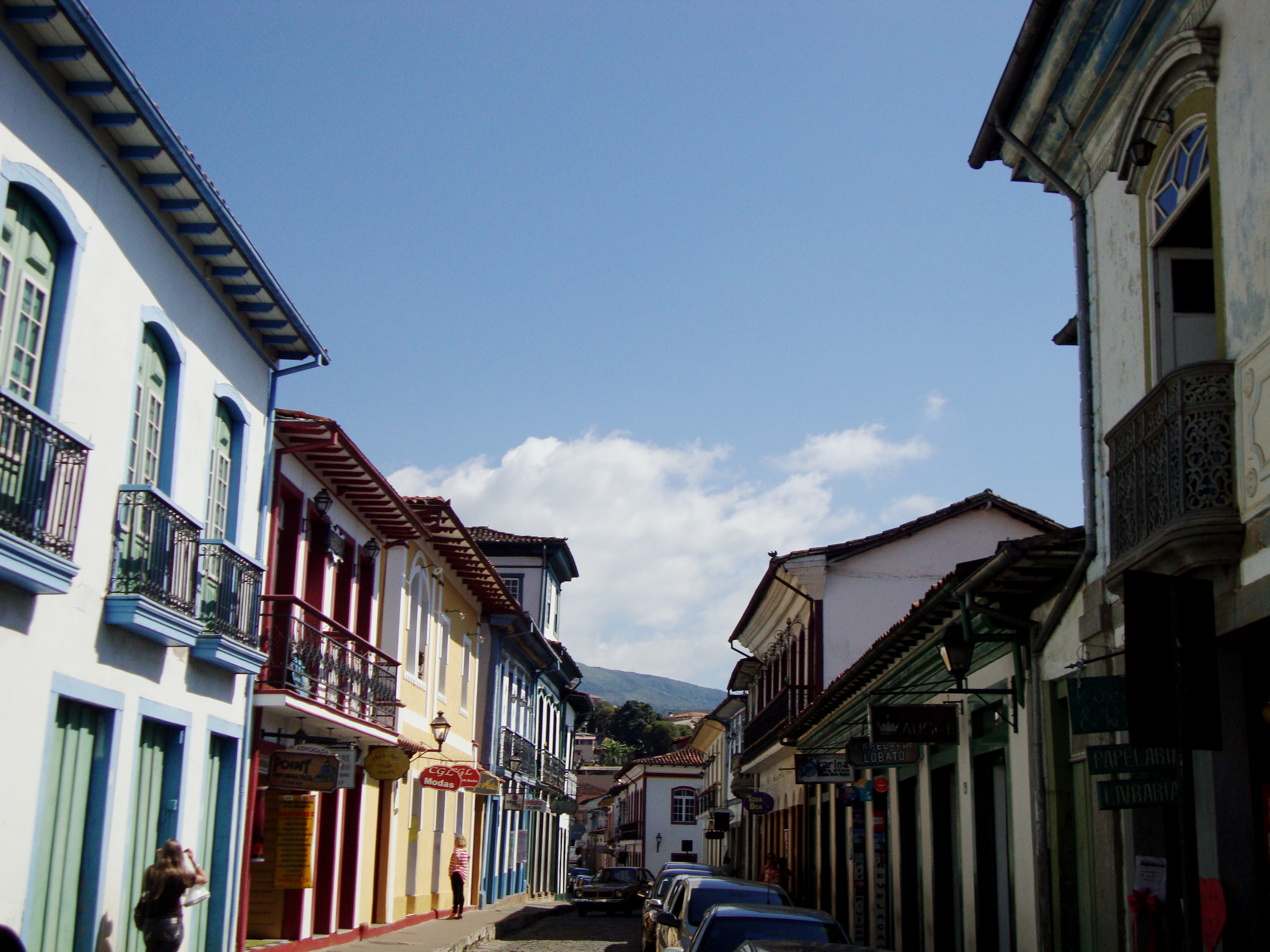 Mariana, MG: conjunto arquitetônico e urbanístico